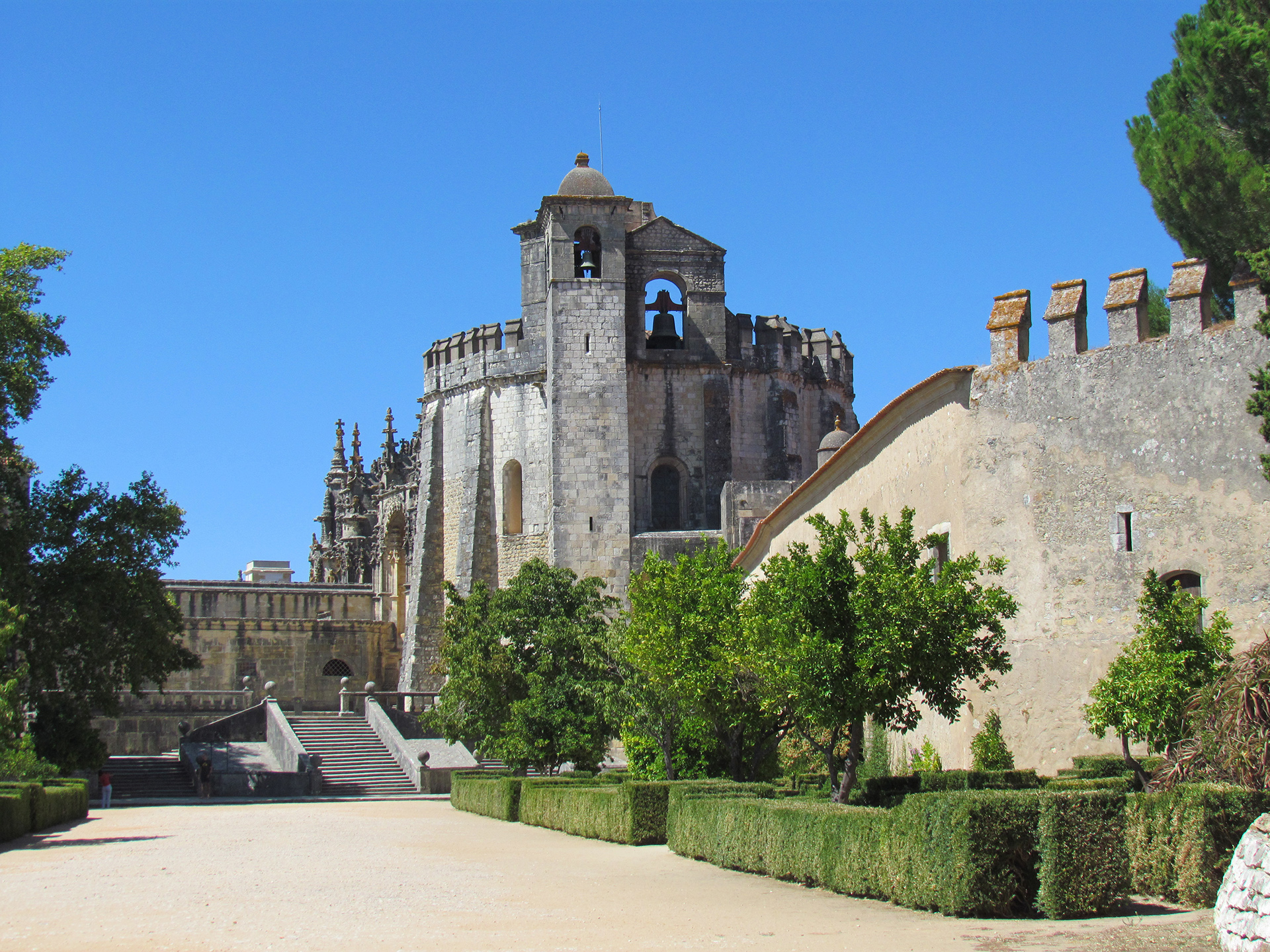 Castelo dos Templários - Tomar